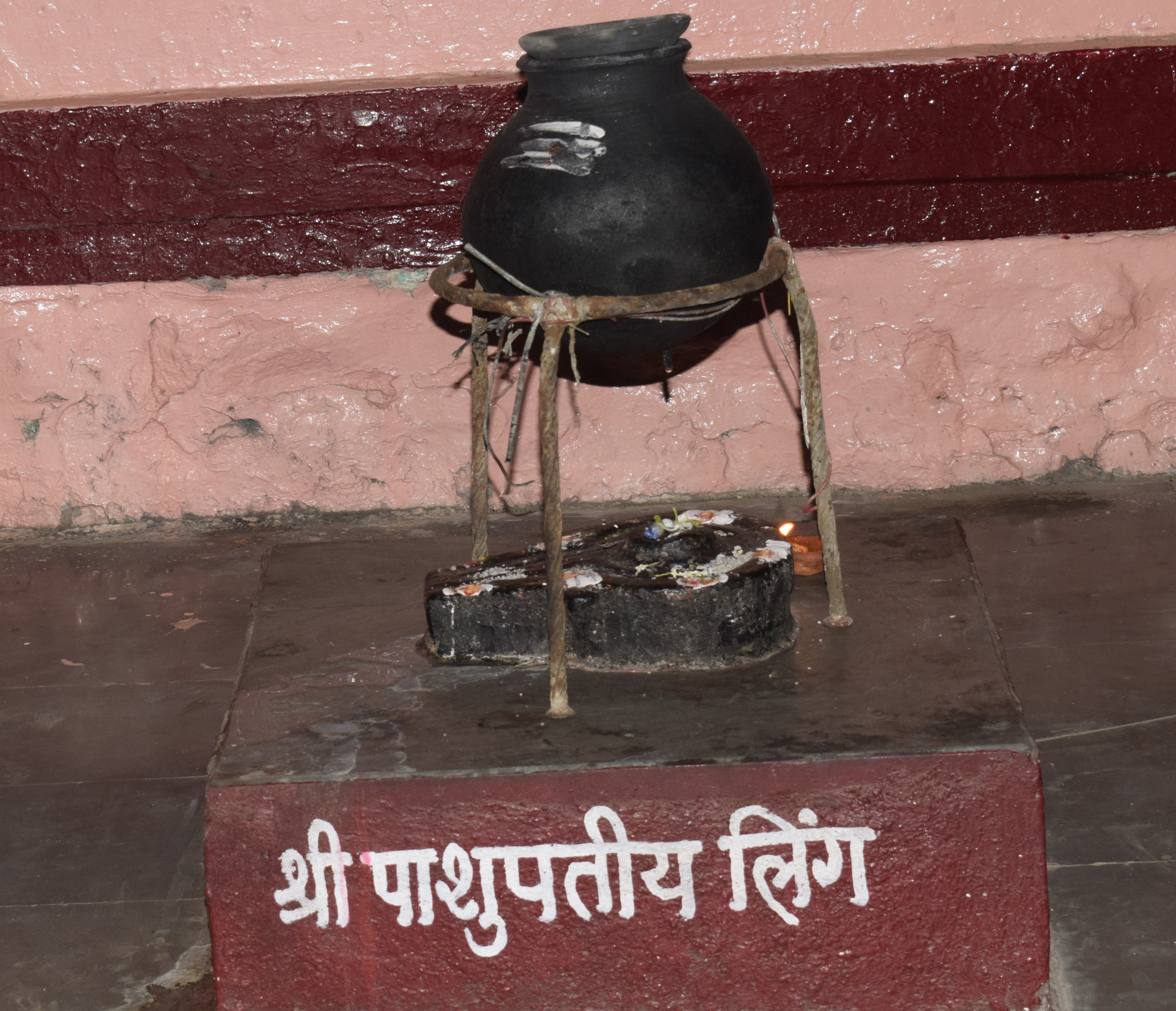 श्री पाशुपतीय लिंग